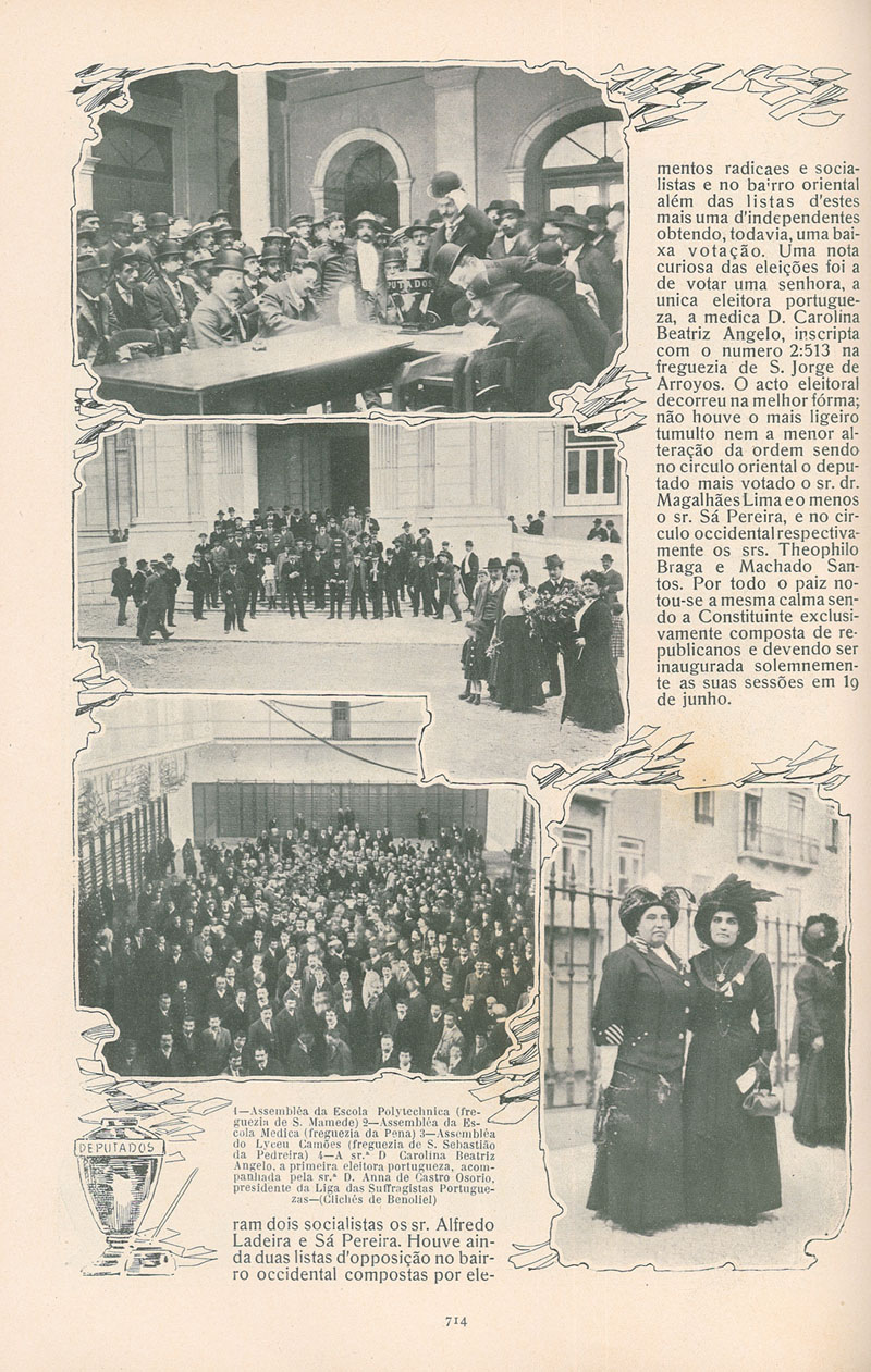 Segunda página do artigo "Estão eleitas as constituintes: A eleição em Lisboa" Illustração Portugueza - Edição semanal do jornal O SECULO Director: Carlos Malheiro Dias Director artistico: Francisco Teixeira Propriedade de: J. J. Da Silva Graça Editor: José Joubert Chaves